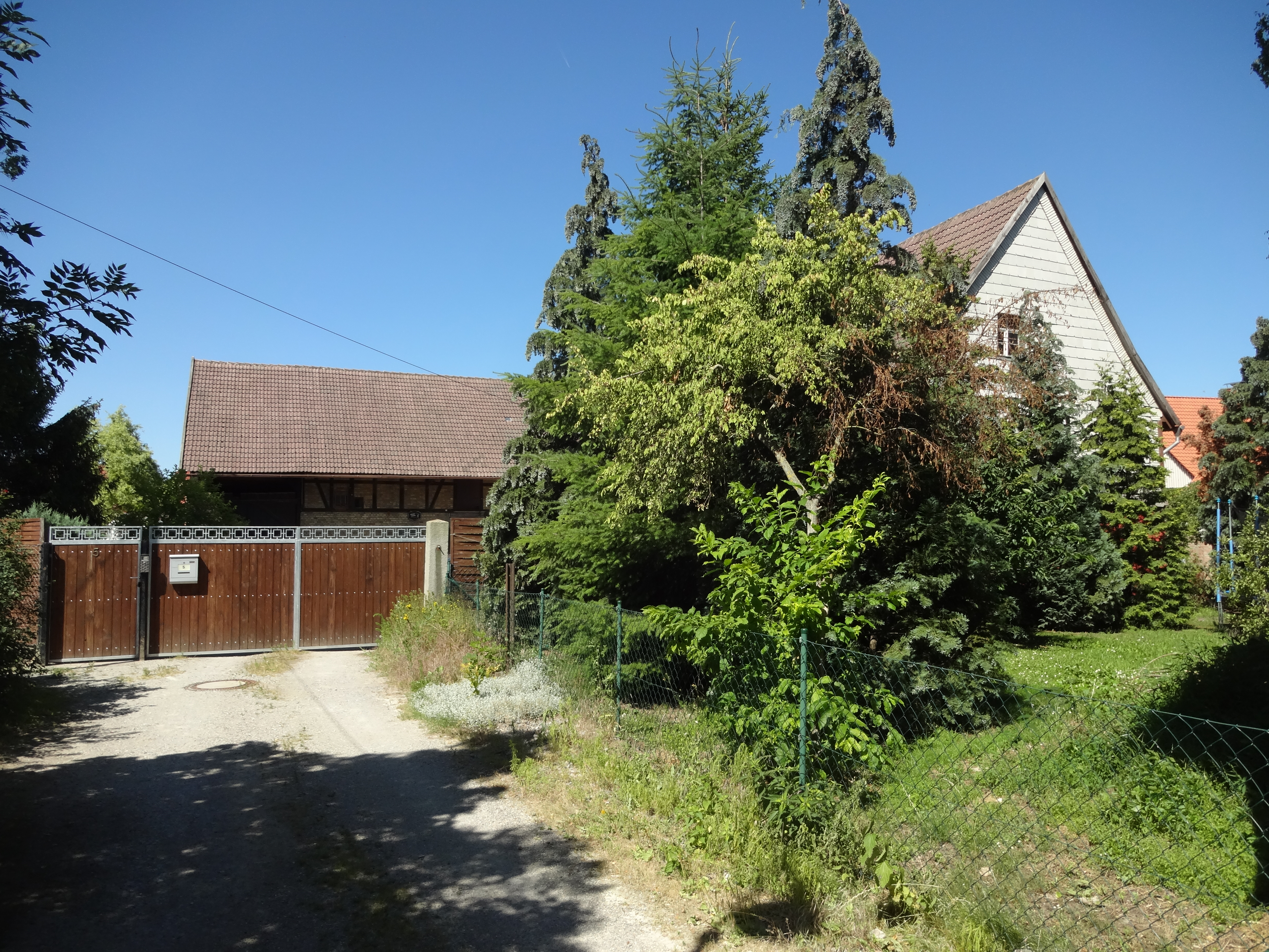 denkmalgeschützter Bauernhof in der Hellwigstraße 5 in Langeln, Gemeinde Nordharz